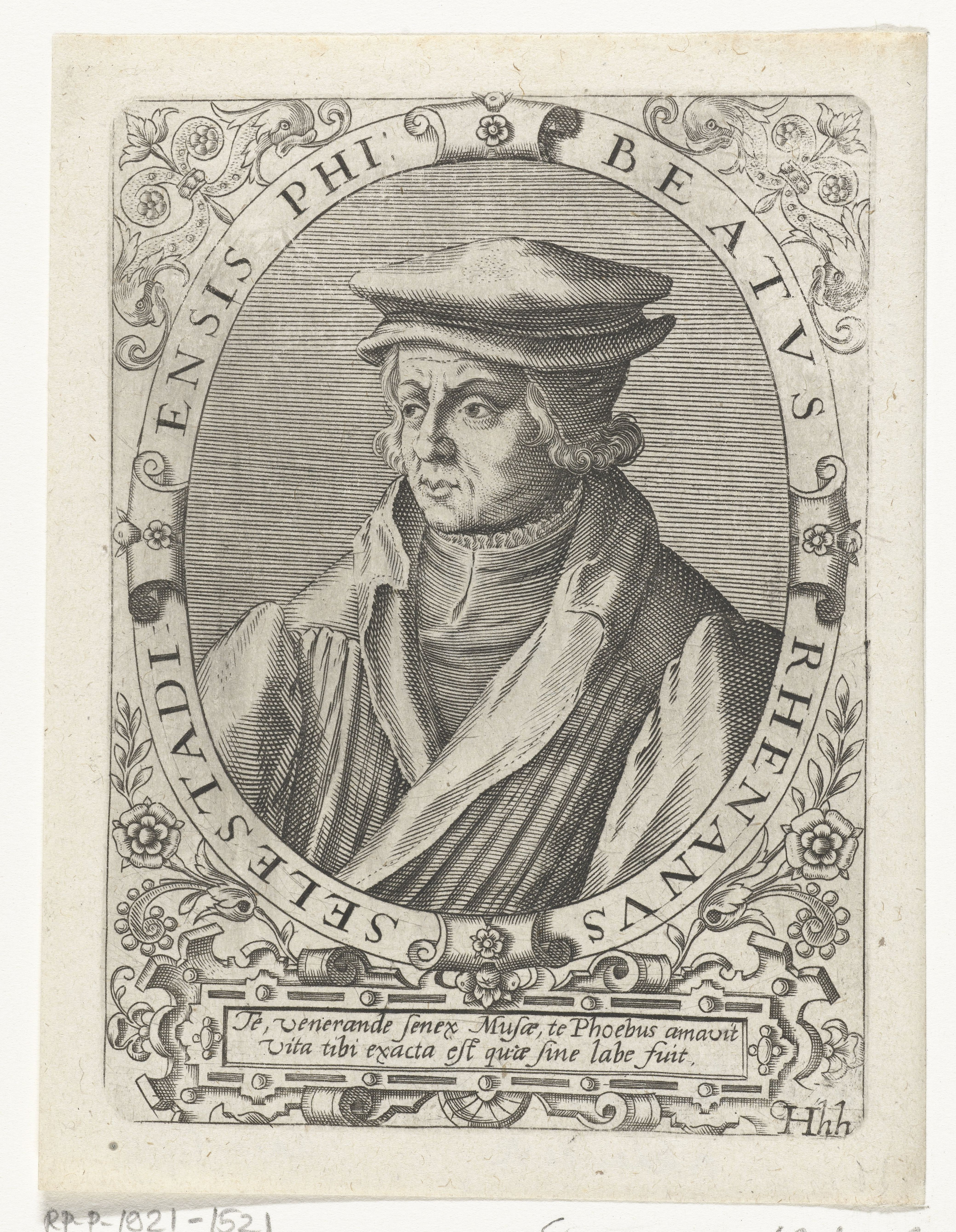 IdentificatieTitel(s): Portret van Beatus RhenanusObjecttype: prent boekillustratie Objectnummer: RP-P-1921-1521Opschriften / Merken: verzamelaarsmerk, verso, gestempeld: Lugt 2233Omschrijving: Borstbeeld van de humanistische geleerde Beatus Rhenanus of Beatus Bild. In ovaal met in het randschrift zijn naam en een verwijzing naar zijn geboorteplaats.VervaardigingVervaardiger: prentmaker: Theodor de Bryprentmaker: Johann Theodor de Brynaar ontwerp van: Jean Jacques Boissard (mogelijk)Plaats vervaardiging: Frankfurt am MainDatering: ca. 1597 - ca. 1599 en/of 1669Fysieke kenmerken: gravureMateriaal: papier Techniek: graveren (drukprocedé)Afmetingen: plaatrand: h 134 mm × b 98 mmToelichtingGemaakt voor: J.J. Boissard, Icones virorum illustrium doctrina &c eruditione praestanti um contines. Frankfurt am Main: de Bry, 1597-1599. Opnieuw gebruikt in: J.J.Boissard, Bibliotheca chalcographica, hoc est Virtute et eruditione clarorum Virorum Imagines. Heidelberg: Clemens Ammon, 1669. Dl. 1-5 (te herkennen aan de toegevoegde signatuur in de rechter onderhoek: 3H).OnderwerpWie: Beatus RhenanusVerwerving en rechtenVerwerving: aankoop 1905Copyright: Publiek domein